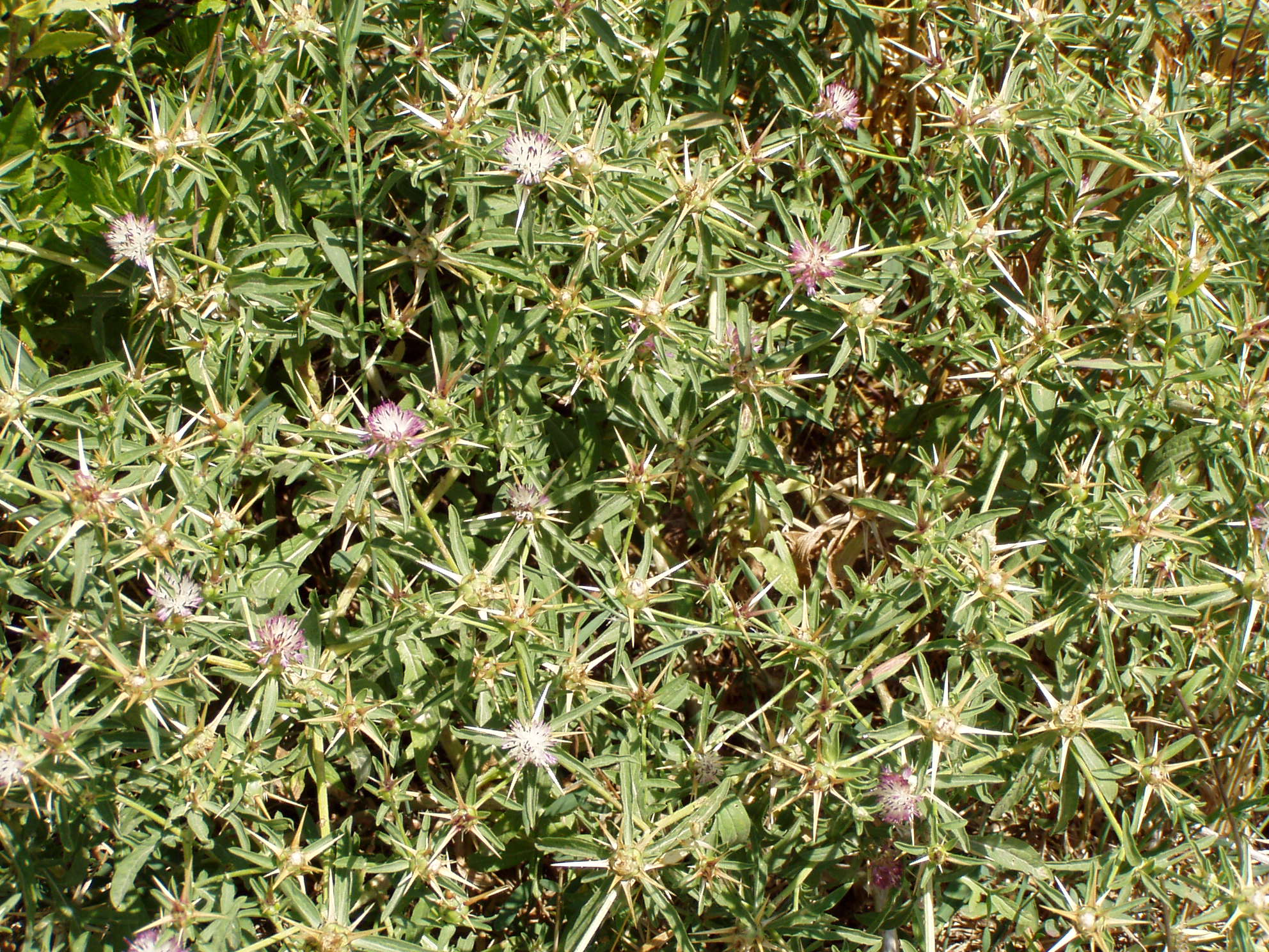 Centaurea iberica דרדר מצוי - ליד יקנעם